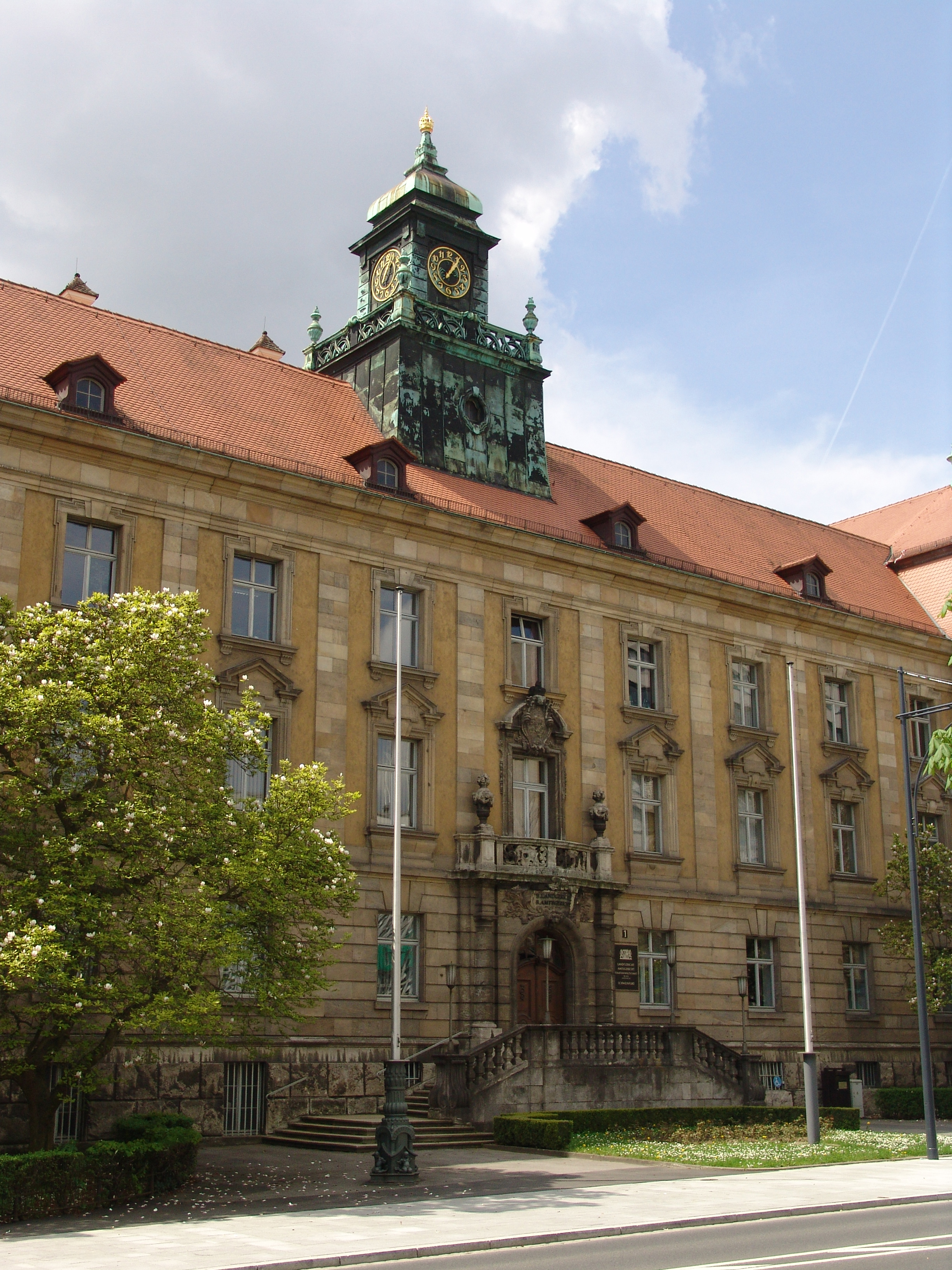 Gerichtsgebäude